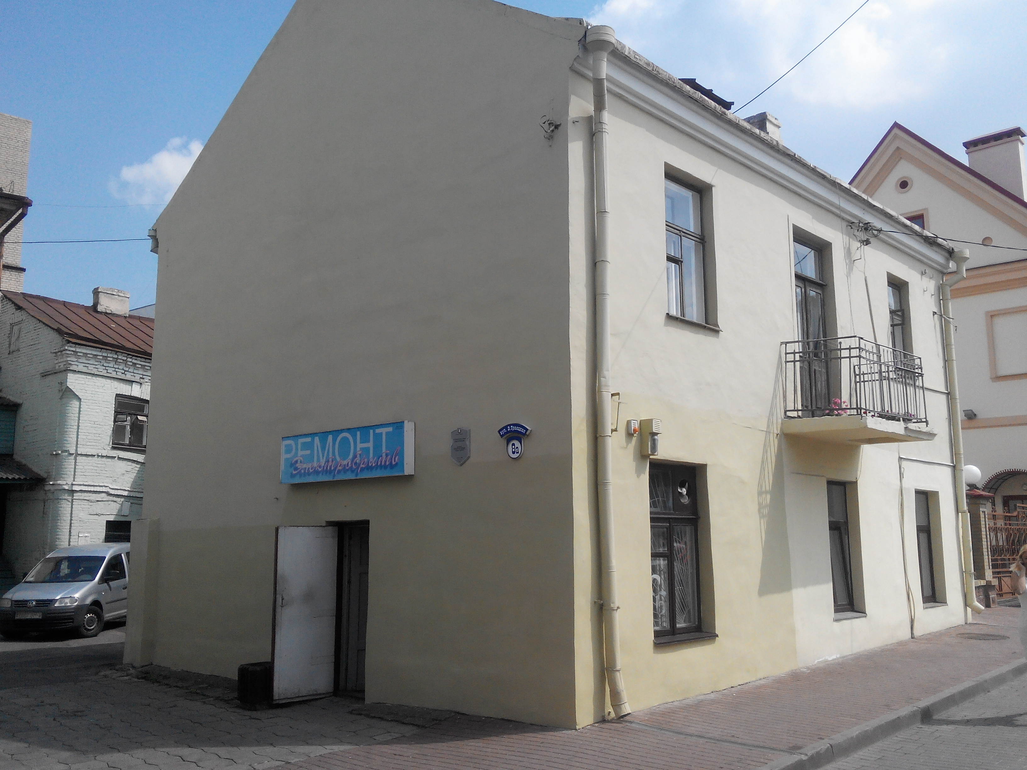 Будынак па вуліцы Вялікая Траецкая, 8а, Гродна, Беларусь